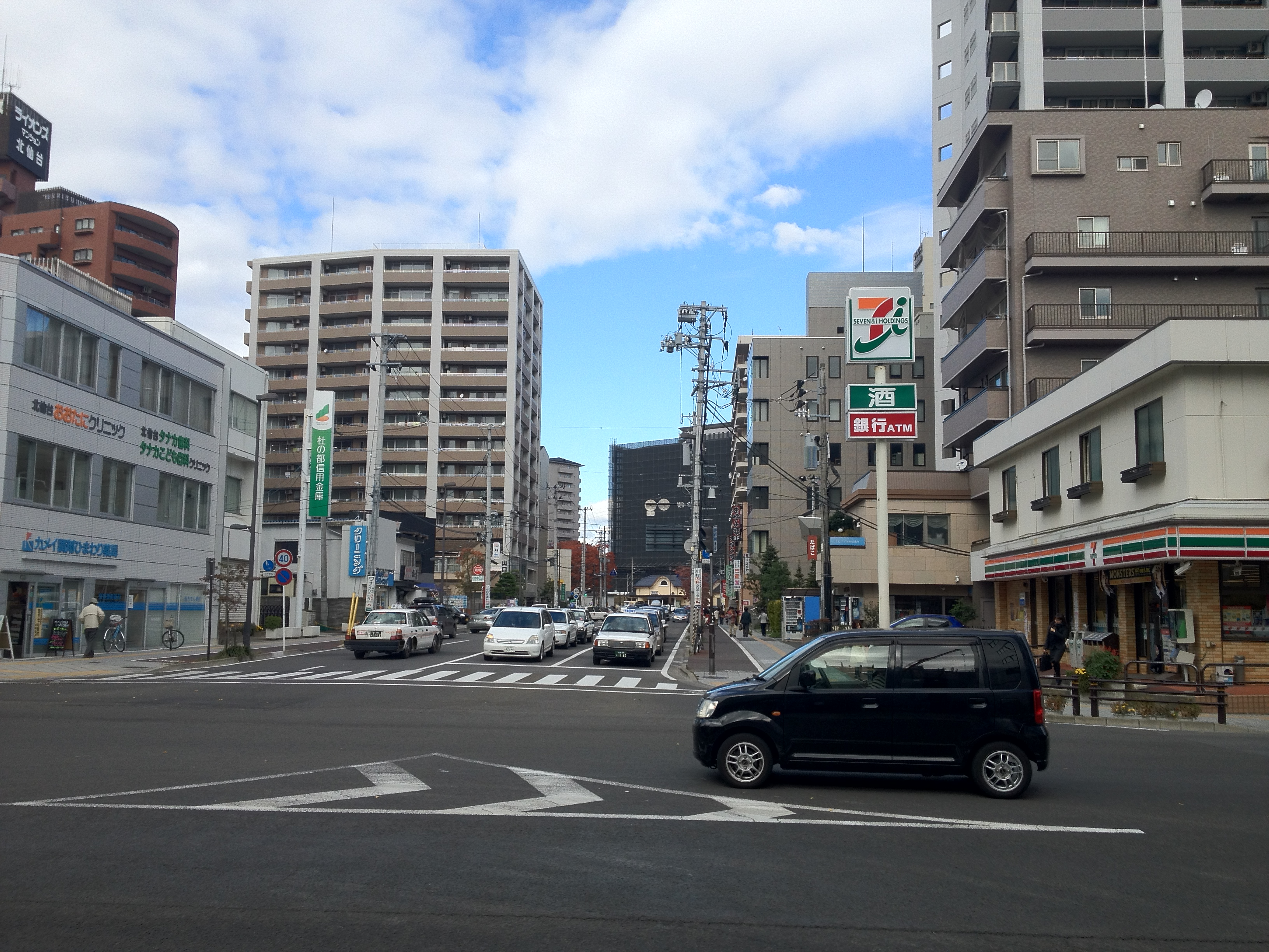 宮城県道136号と北仙台駅周辺（2012.11.10 撮影）